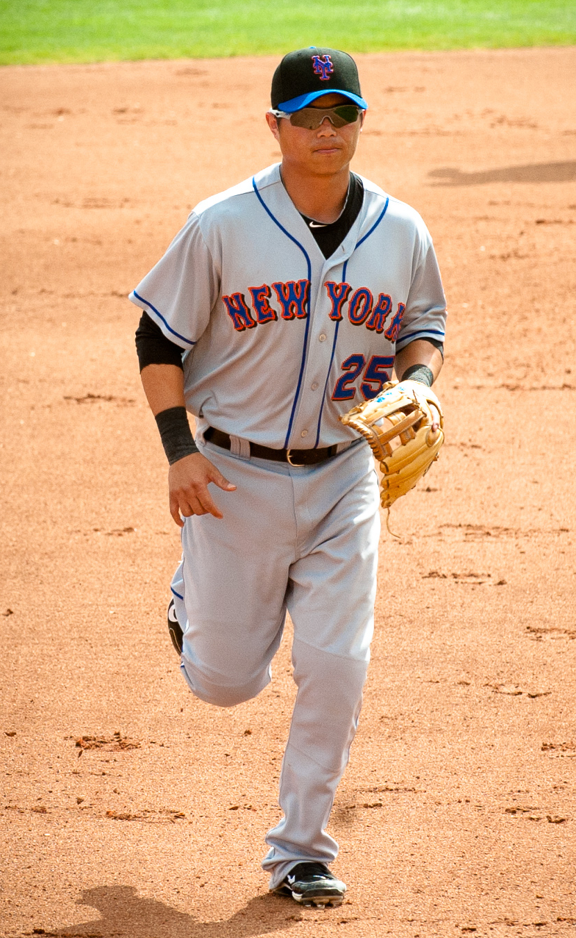 Chin-lung Hu